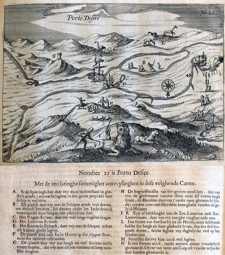 PD wegens ouderdom. Jacob le Maire overleden 1616